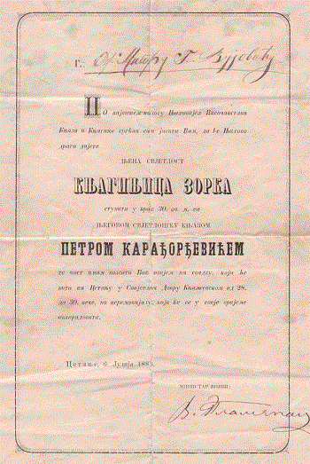 Српски (ћирилица): Позивинца на вечање кнеза Петра Карађорђевића и књегиње Зорке Петровић, ћерке краља Николе Петровића, црногорског